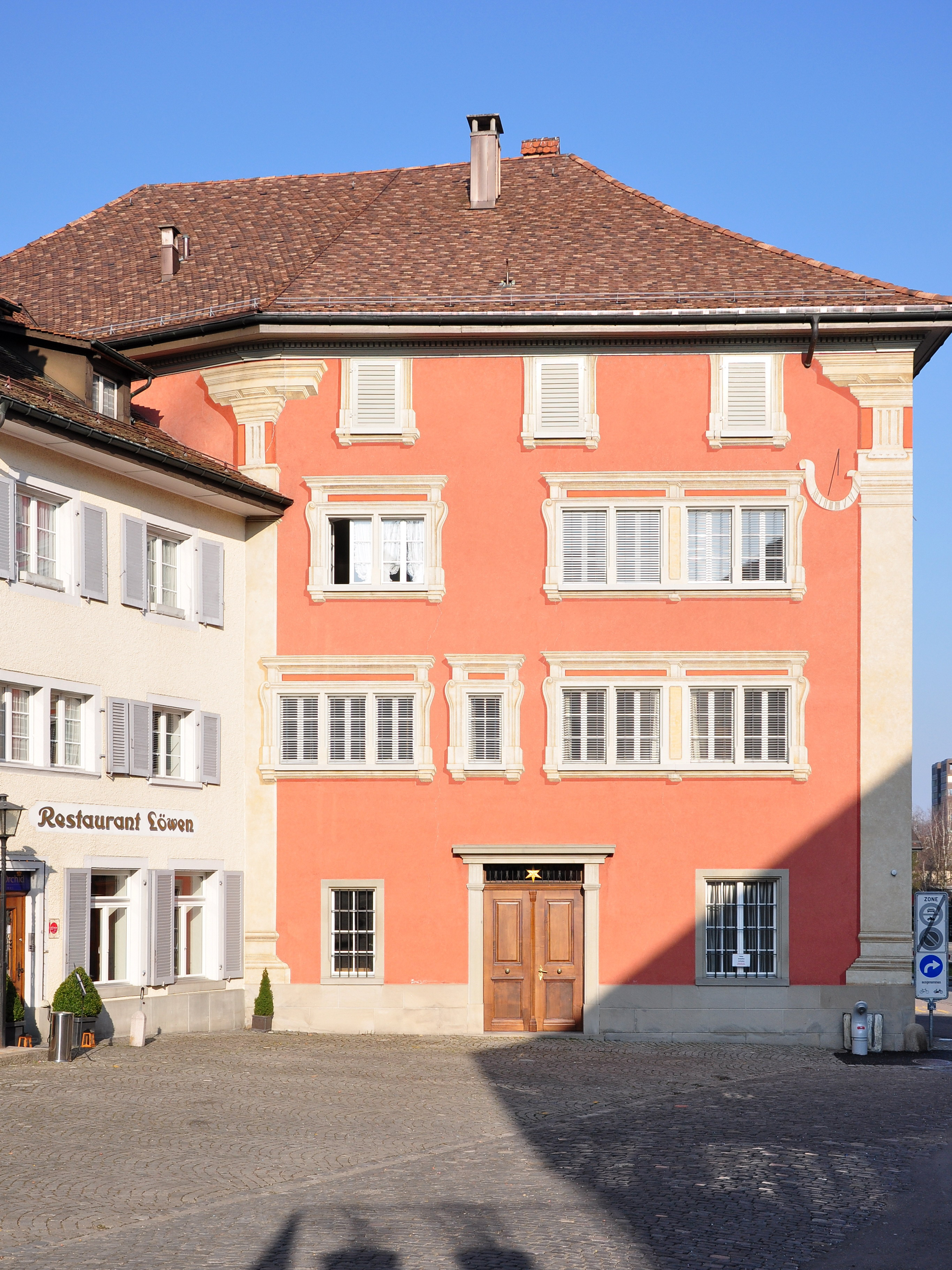 Haus zum Alten Sternen, Engelplatz in Rapperswil (Switzerland)